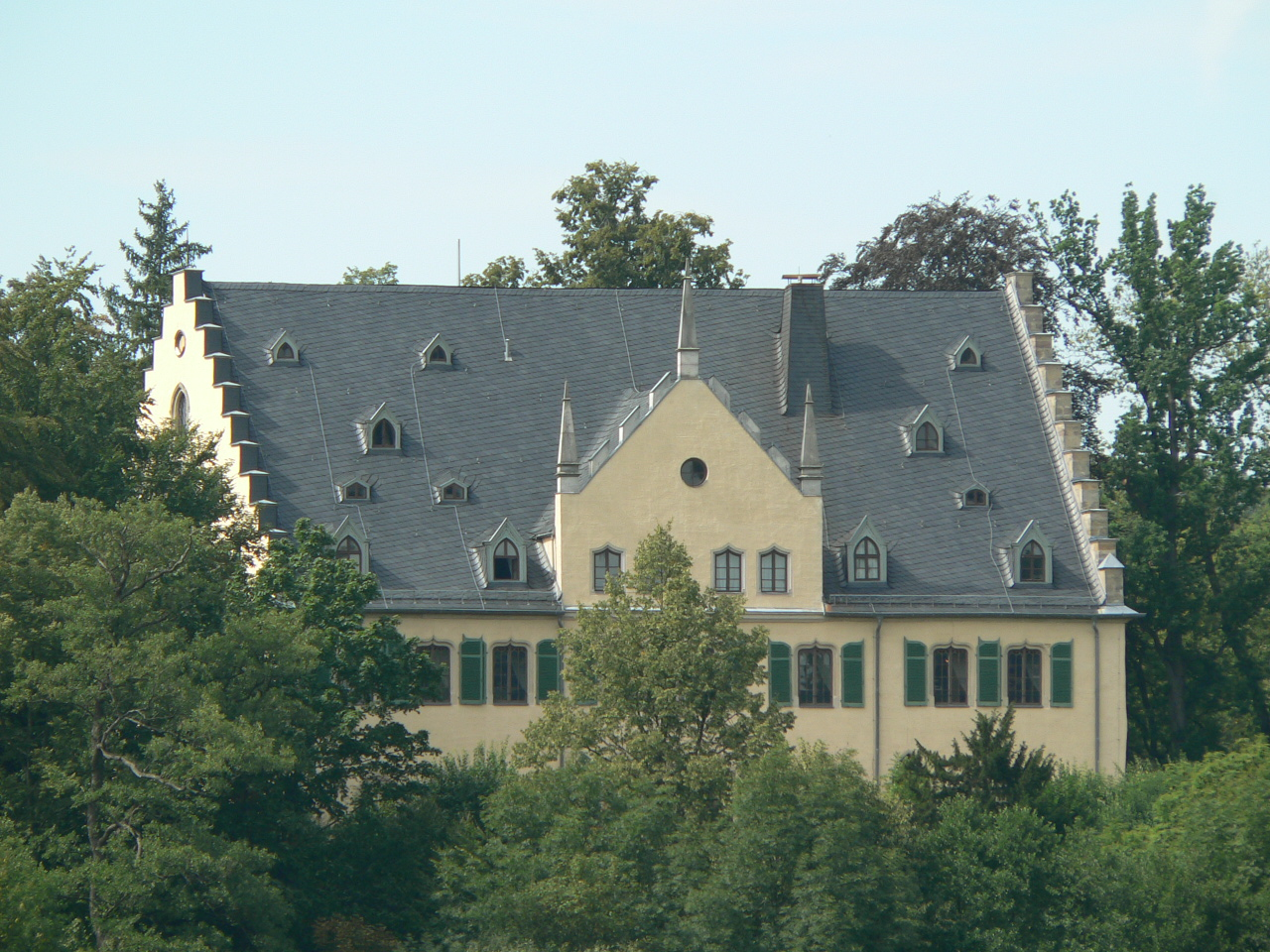 Schloss Rosenau bei Coburg, Ostansicht